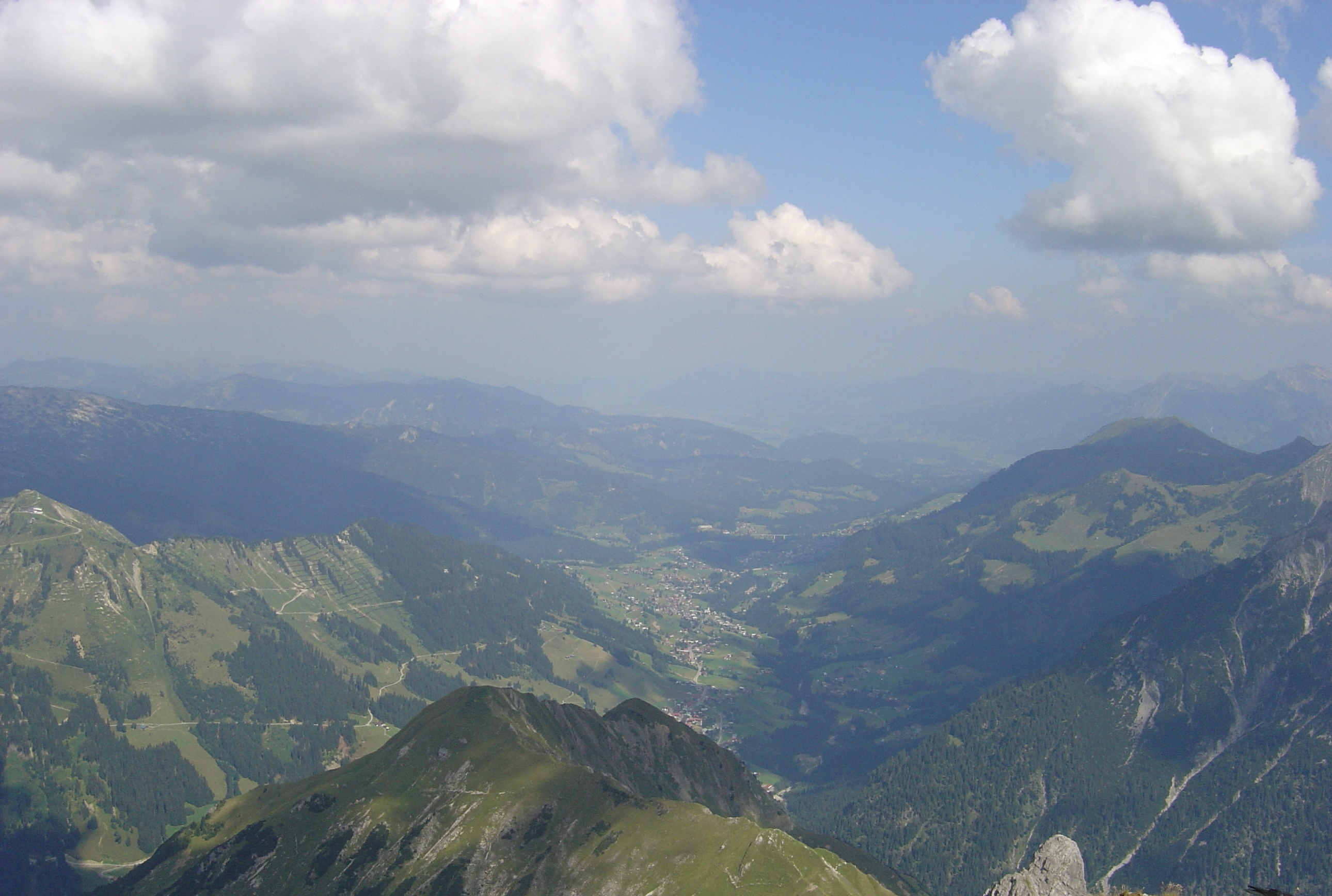 Blik in het Kleinwalsertal vanop de Widderstein.